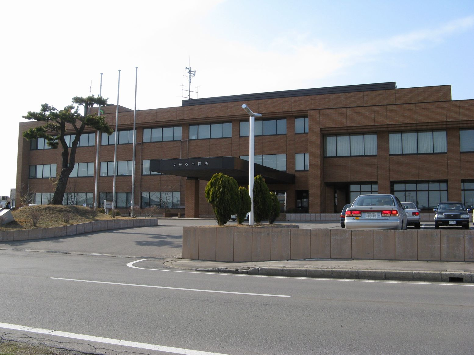 Tsugaru City Hall, Tsugaru, Aomori, Japan (つがる市役所)